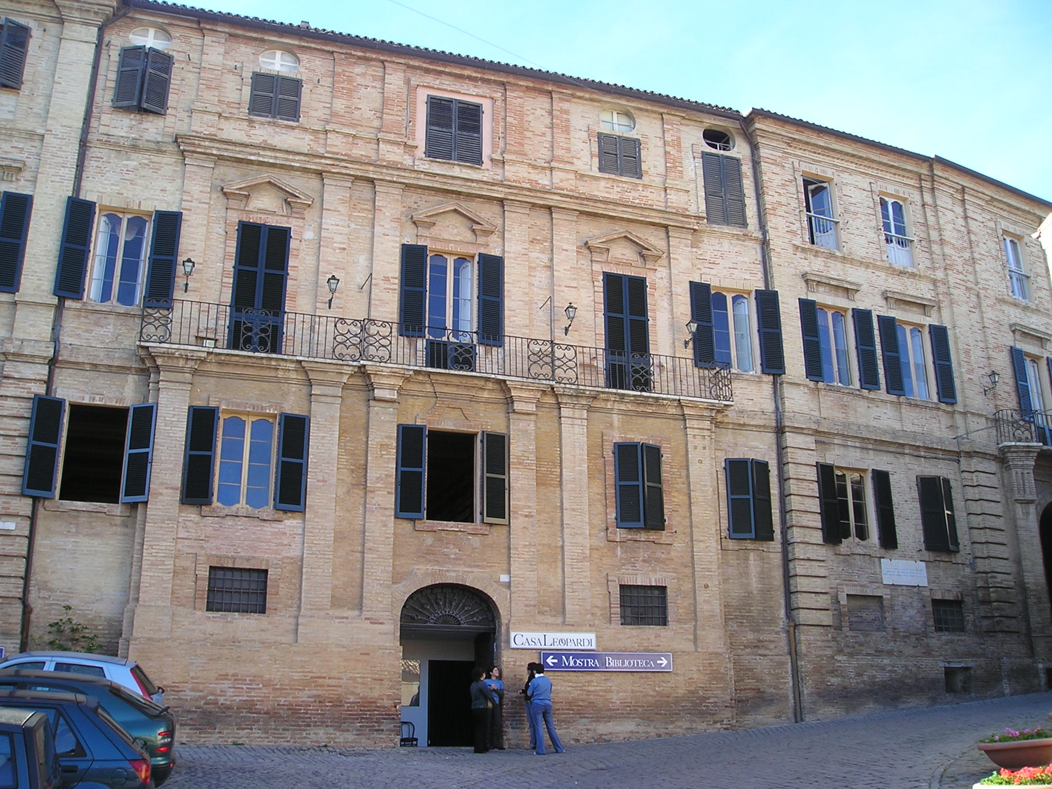 Giacomo Leopardi's house in Recanati